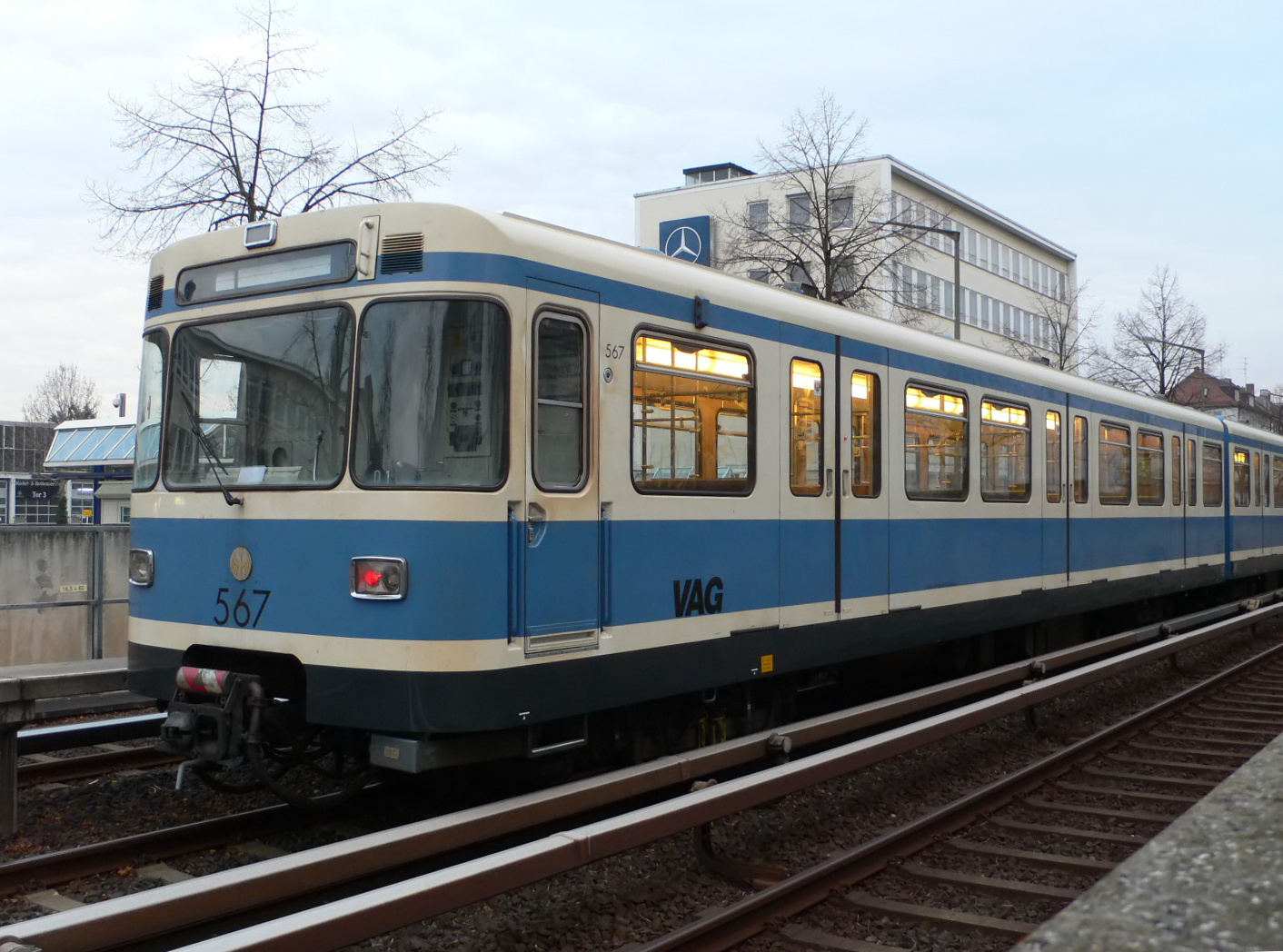 Doppeltriebwagen 567/568 der U-Bahn Nürnberg in der Abstellanlage Eberhardshof.